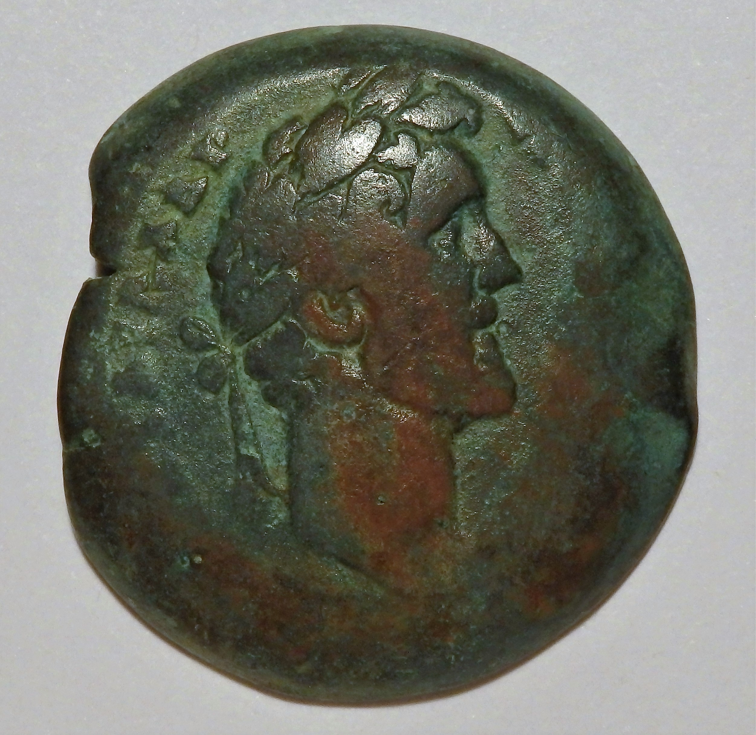 Alexandrinische Bronzedrachme mit Portrait von Antoninus Pius, Kampmann/Ganschow 35.539